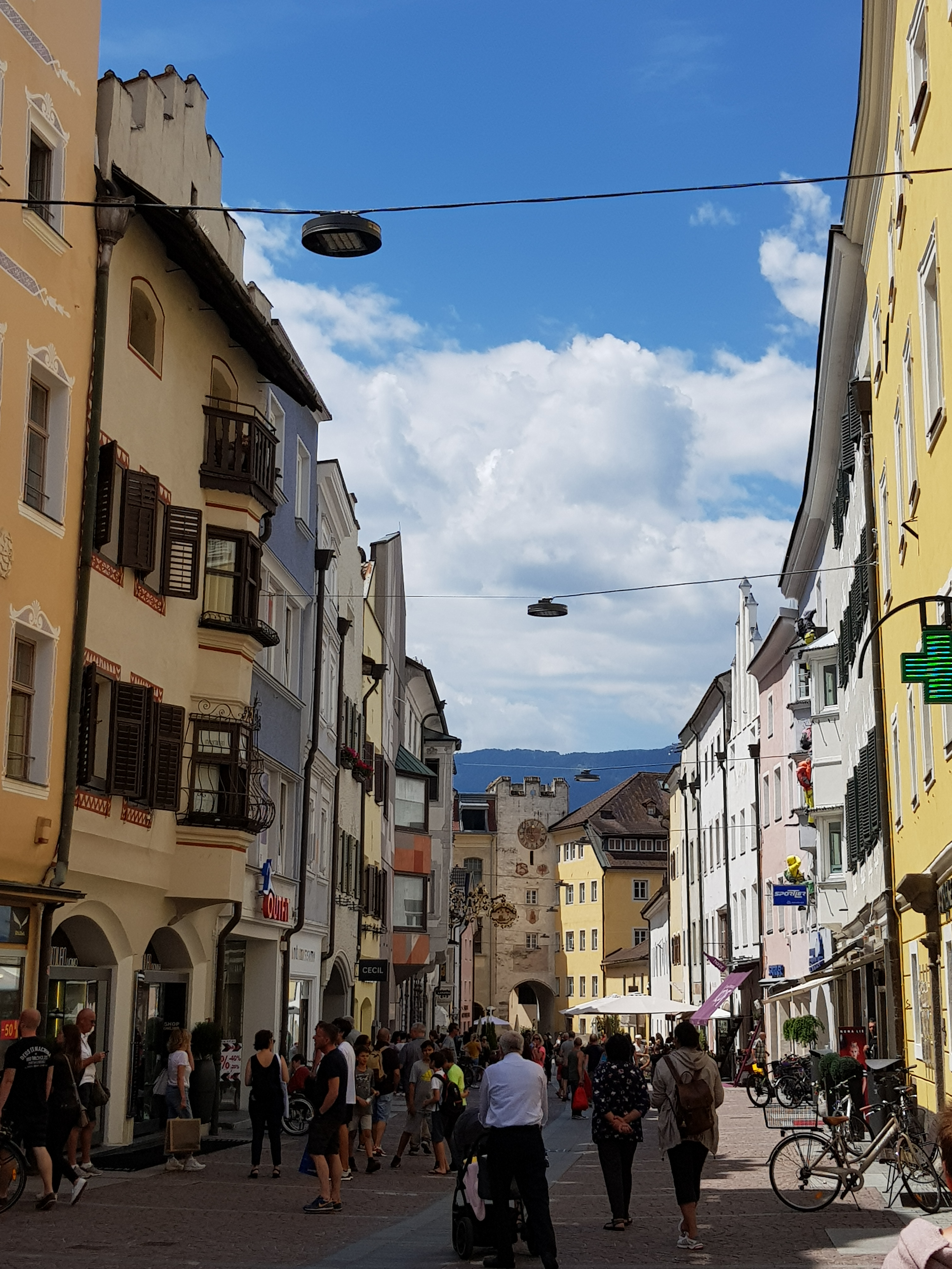 Stadtgasse, Bruneck, Südtirol